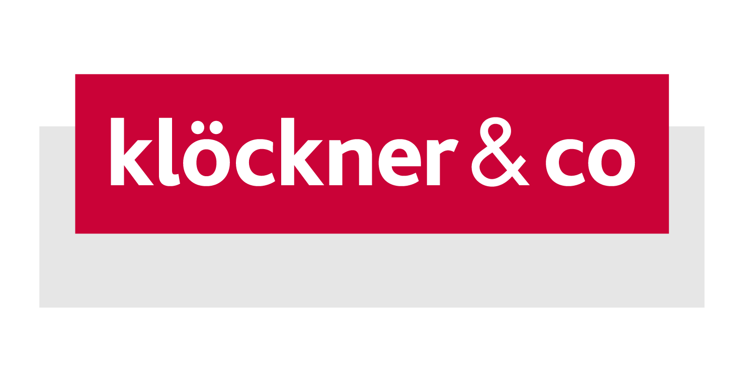 Logo von Klöckner & Co SE